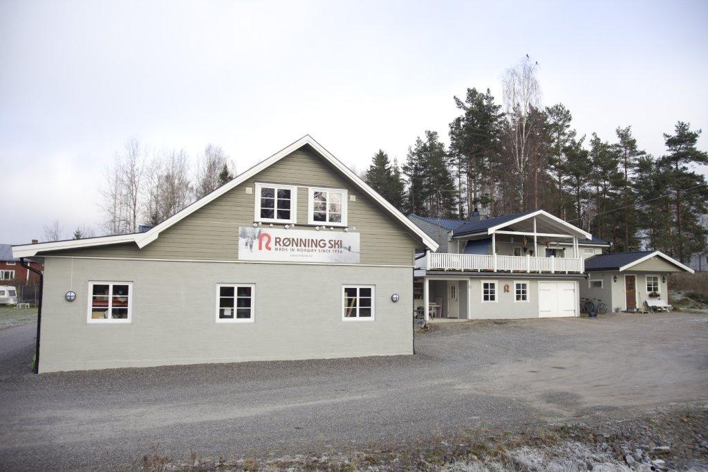 Bilde av Rønning Treski's fabrikk på Skotterud.